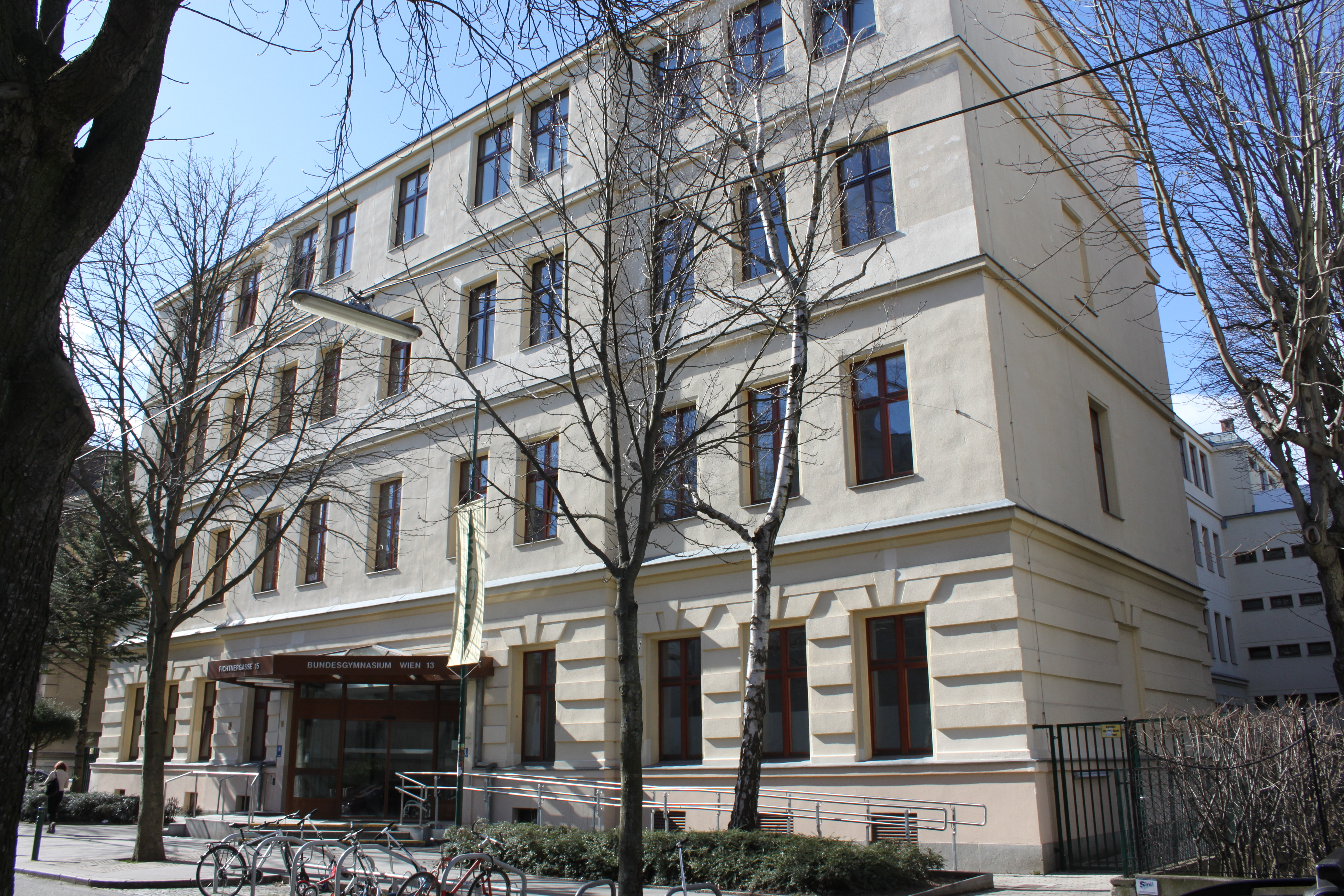 Gymnasium Fichtnergasse, Hauptfront in der Fichtnergasse